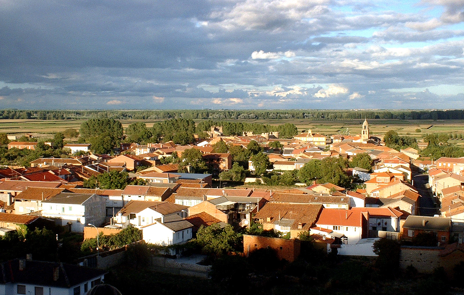 Alija del Infantado, pueblo de la provincia de León (España), dónde se produjo una importante batalla entre el ejército francés, mandado directamente por Napoleón, y las fuerzas inglesas que se retiraban hacia Galicia, durante la Guerra de la Independencia (1804-1812)